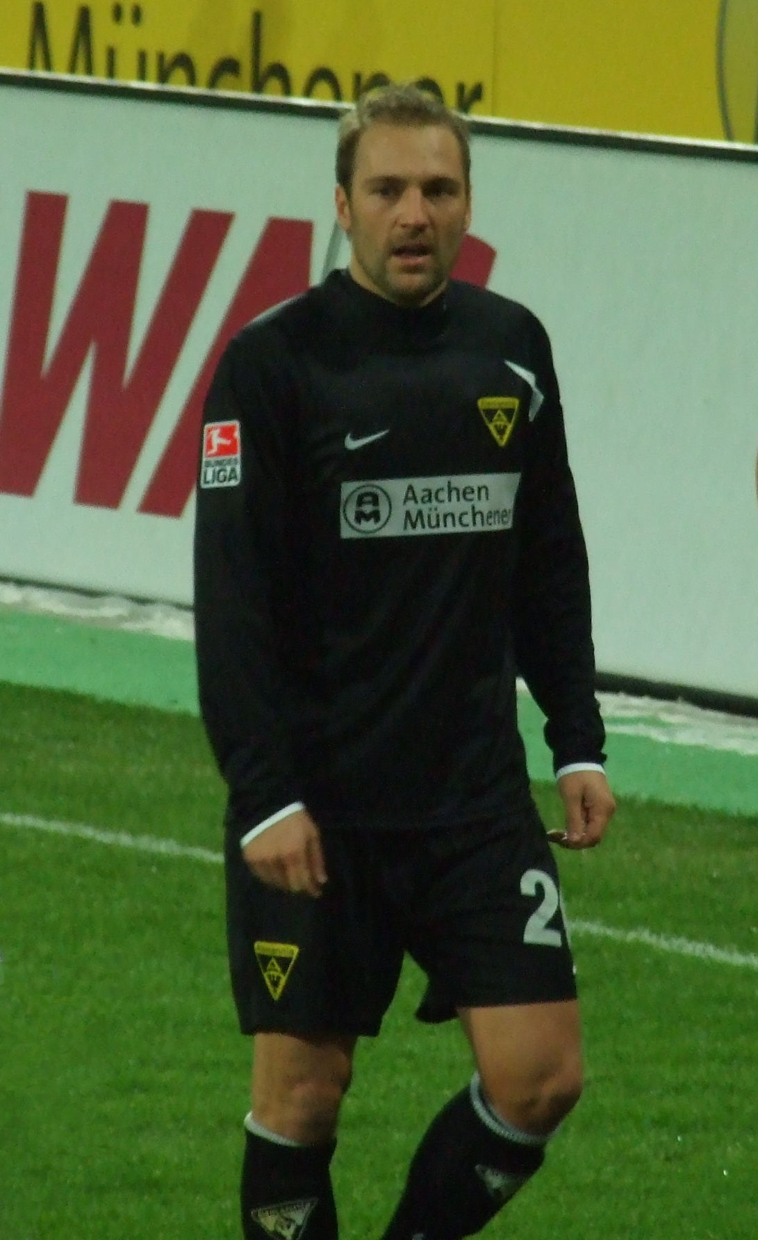 Patrick Milchraum beim Fußballspiel Alemannia Aachen - Karlsruher SC